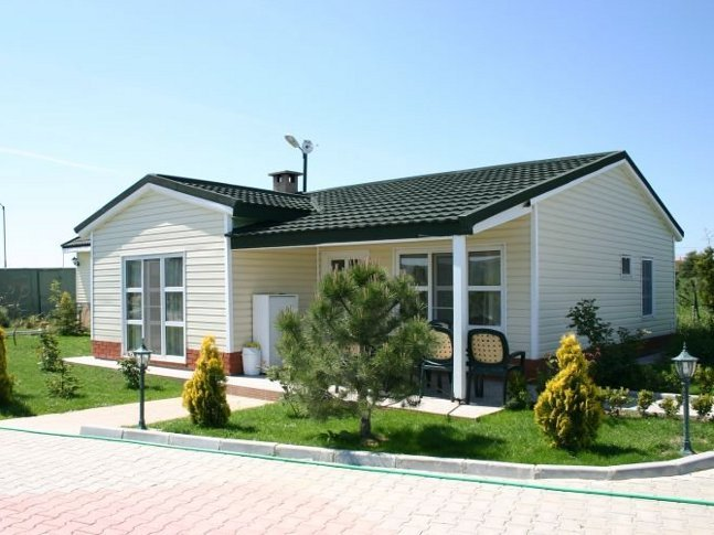 ویلای صفاری در تبریز در سال 1357